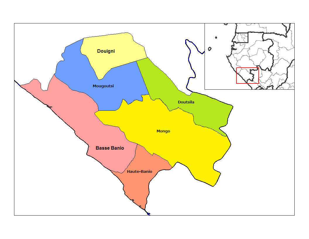 ニャンガ州（Nyanga）の県（Departement）の地図。ガボン2013年国勢調査の資料に基づく：[1]